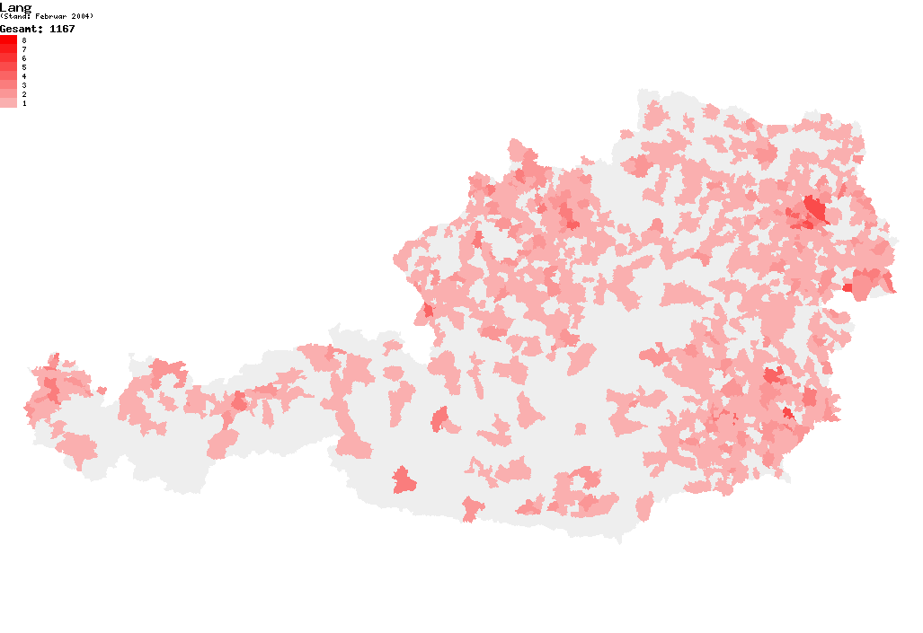 Verteilung des Nachnamens Lang in Österreich nach dem Telefonbuch mit Stand vom Februar 2004